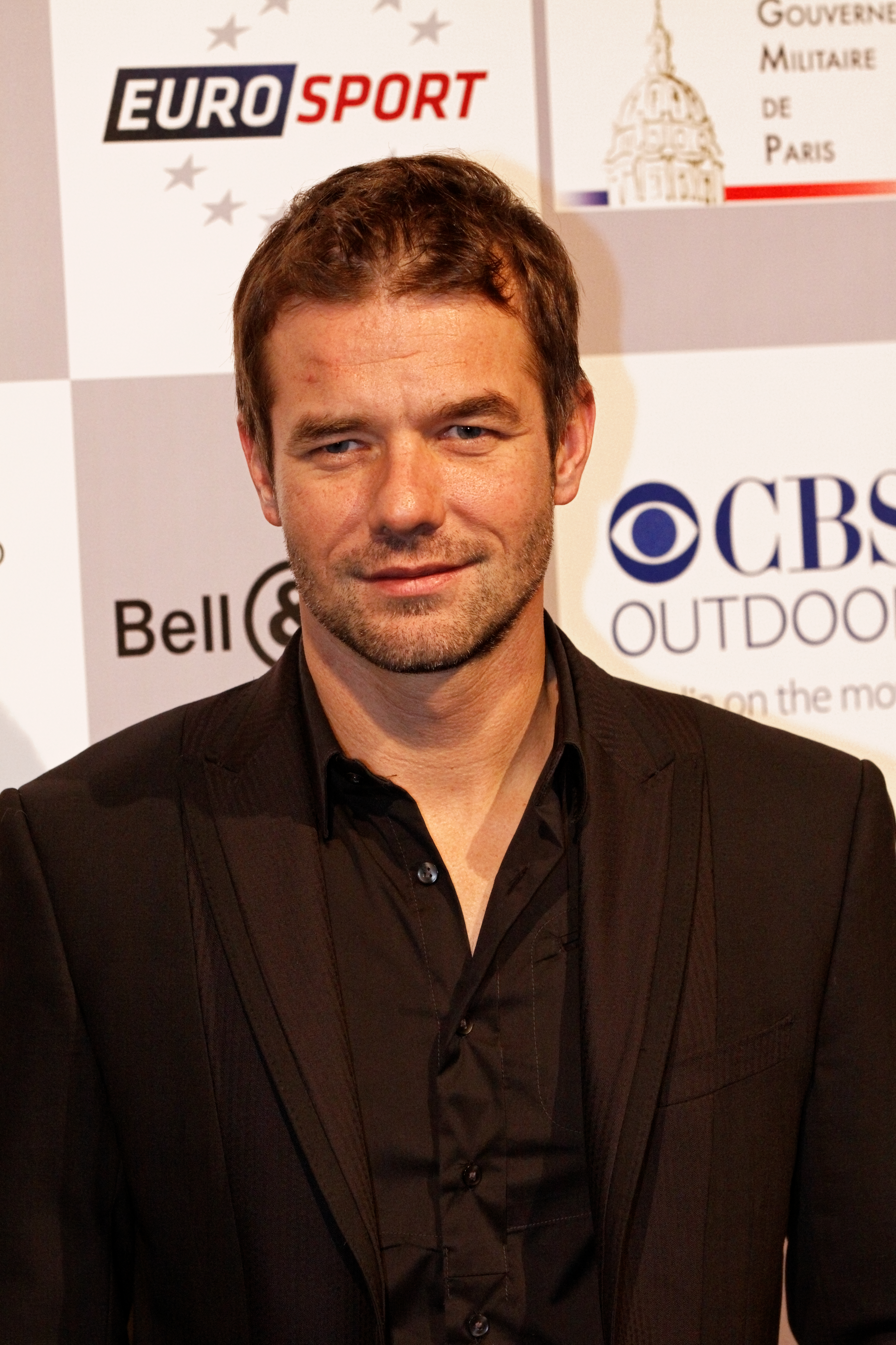 Sébastien Loeb lors du photocall du festival automobile international 2012